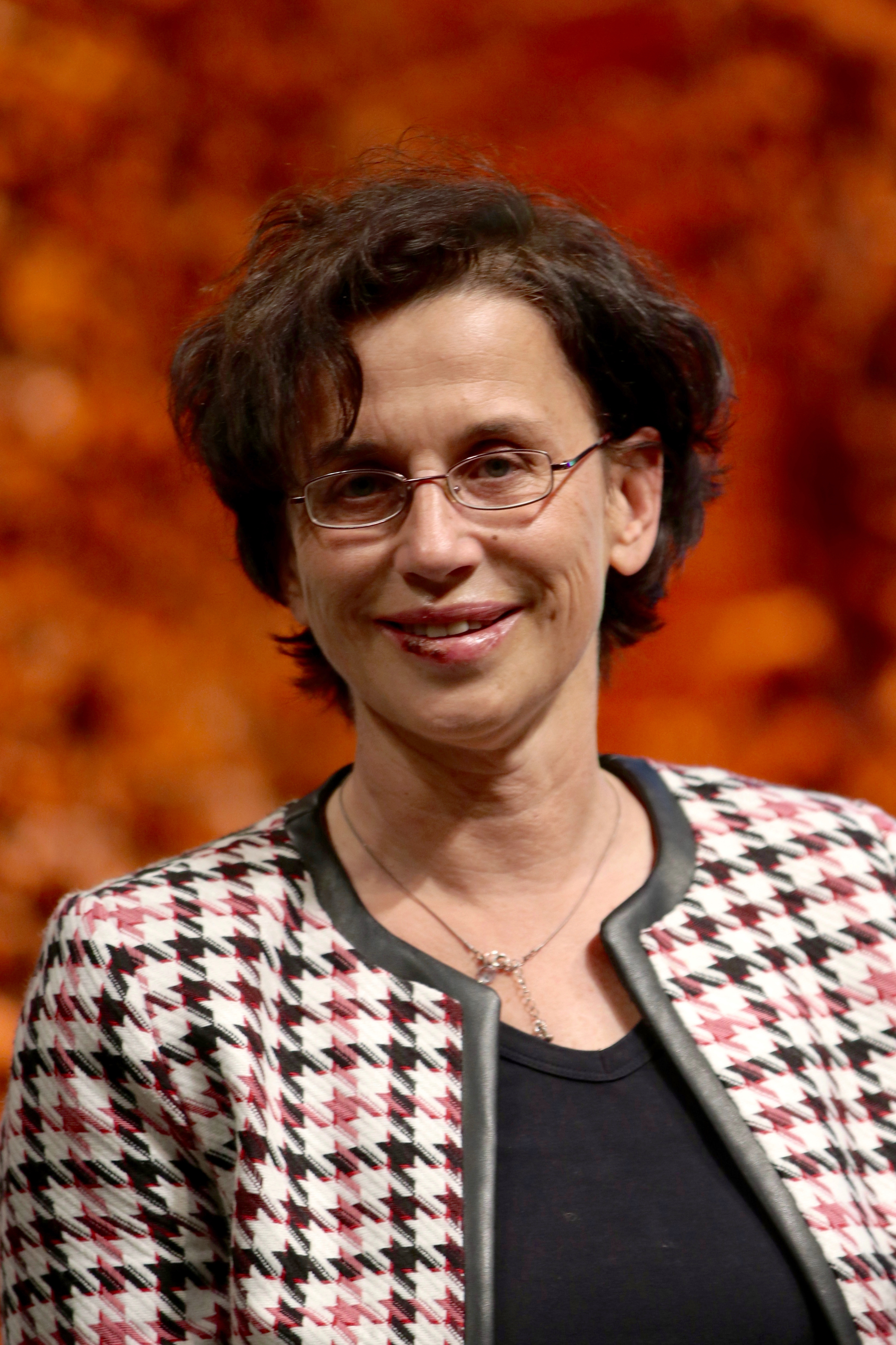 Cornelia Koppetsch beim Bayerischen Buchpreis 2019 in der Münchner Allerheiligenhofkirche.